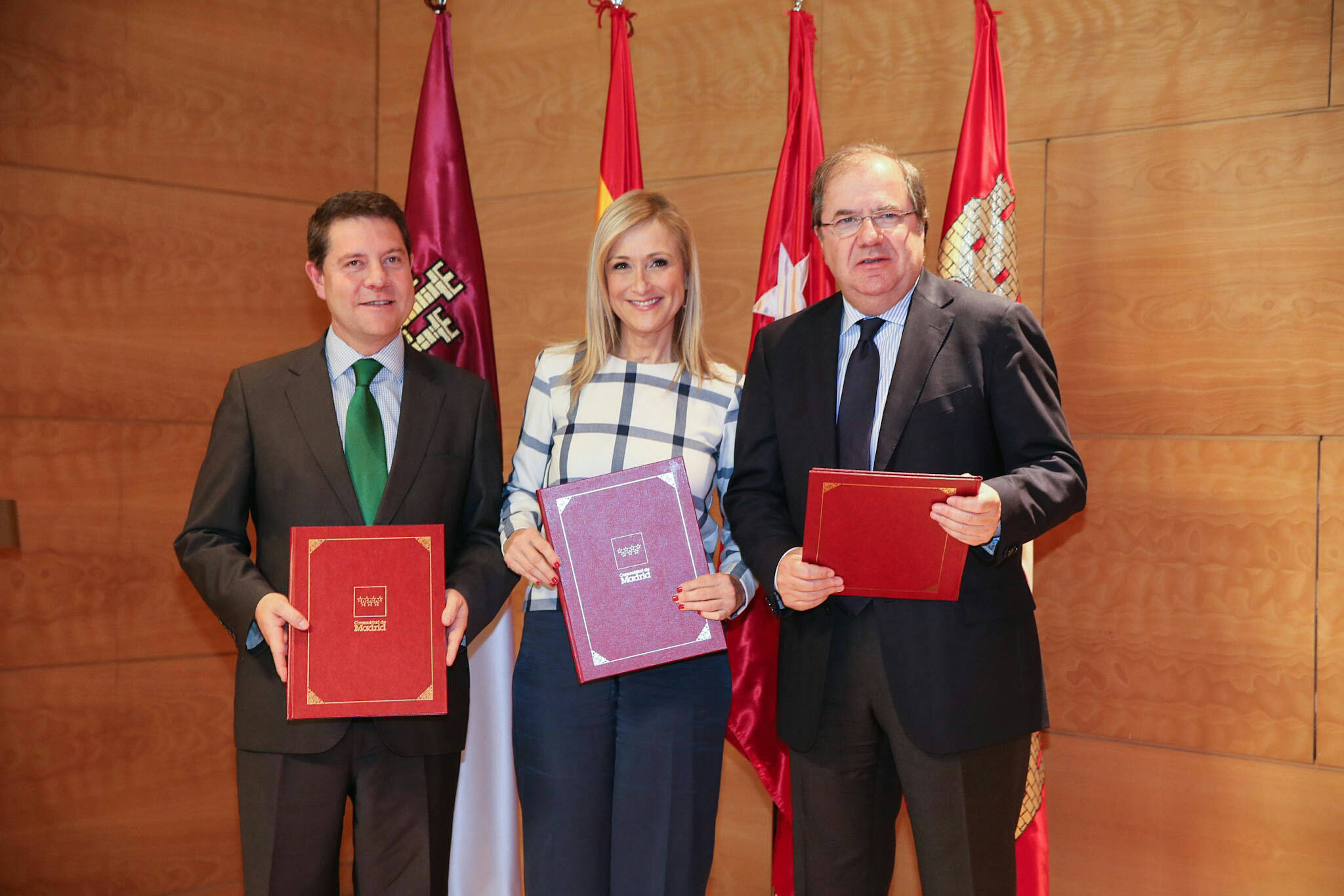 El presidente de Castilla-La Mancha, Emiliano García-Page, ha firmado con su homóloga en la Comunidad de Madrid, Cristina Cifuentes, el convenio de transporte público entre ambas comunidades que mejora las condiciones de este servicio a jóvenes castellano-manchegos de zonas limítrofes. (FOTOS: Ignacio López // JCCM)